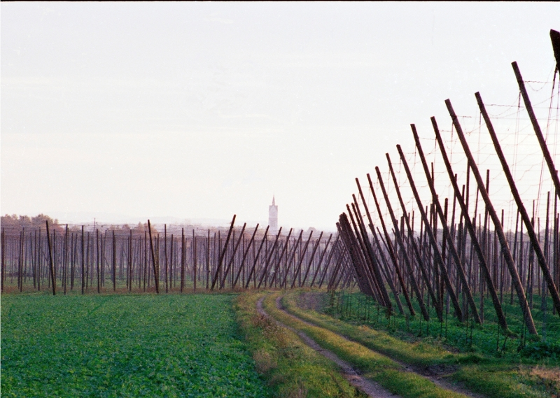 Herbstlicher Hopfengarten in Neustadt a.d. Donau